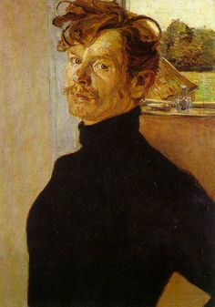 Selbstporträt